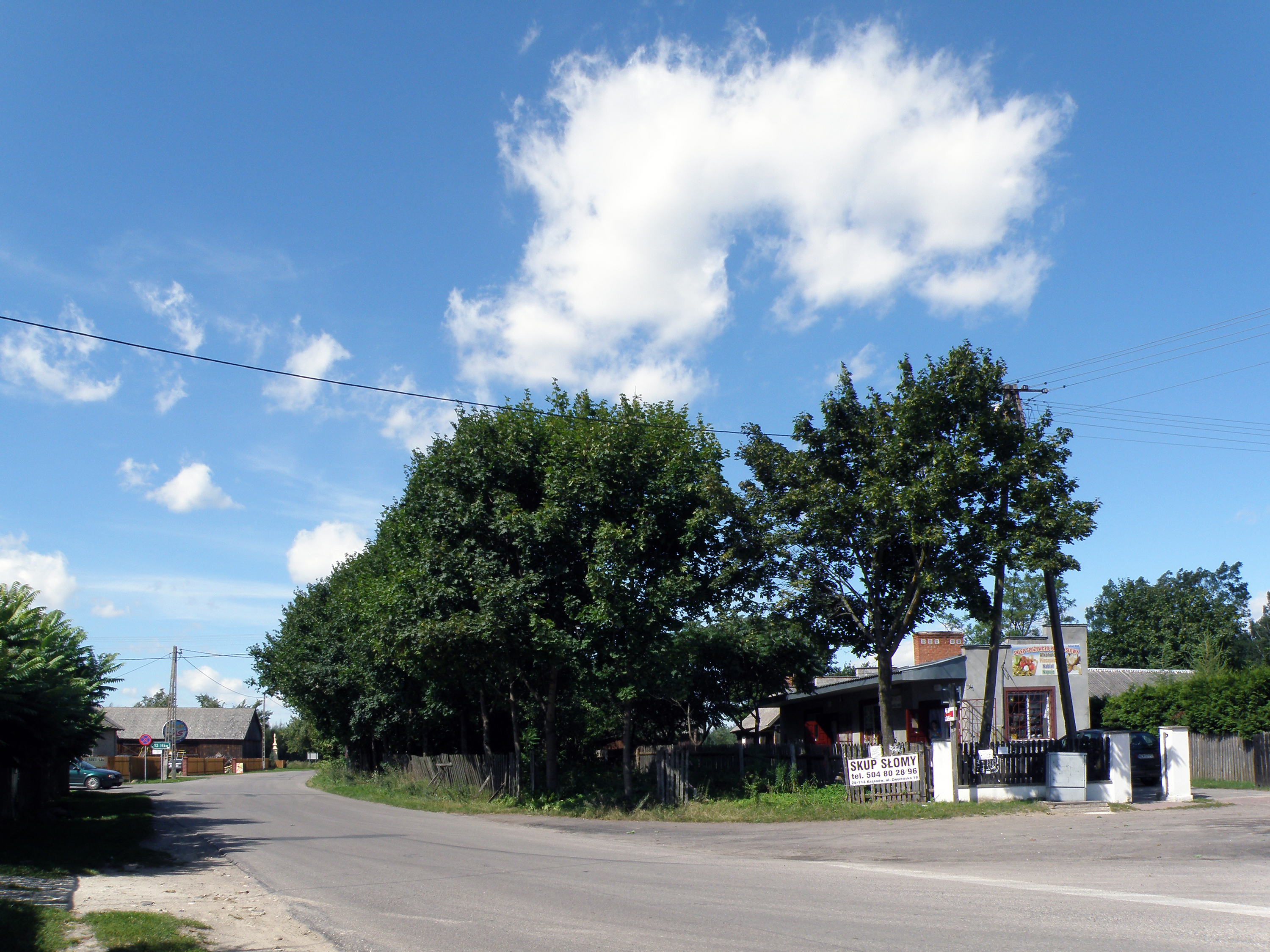 Wólka Gonciarska – wieś w województwie mazowieckim, w powiecie zwoleńskim, w gminie Kazanów.